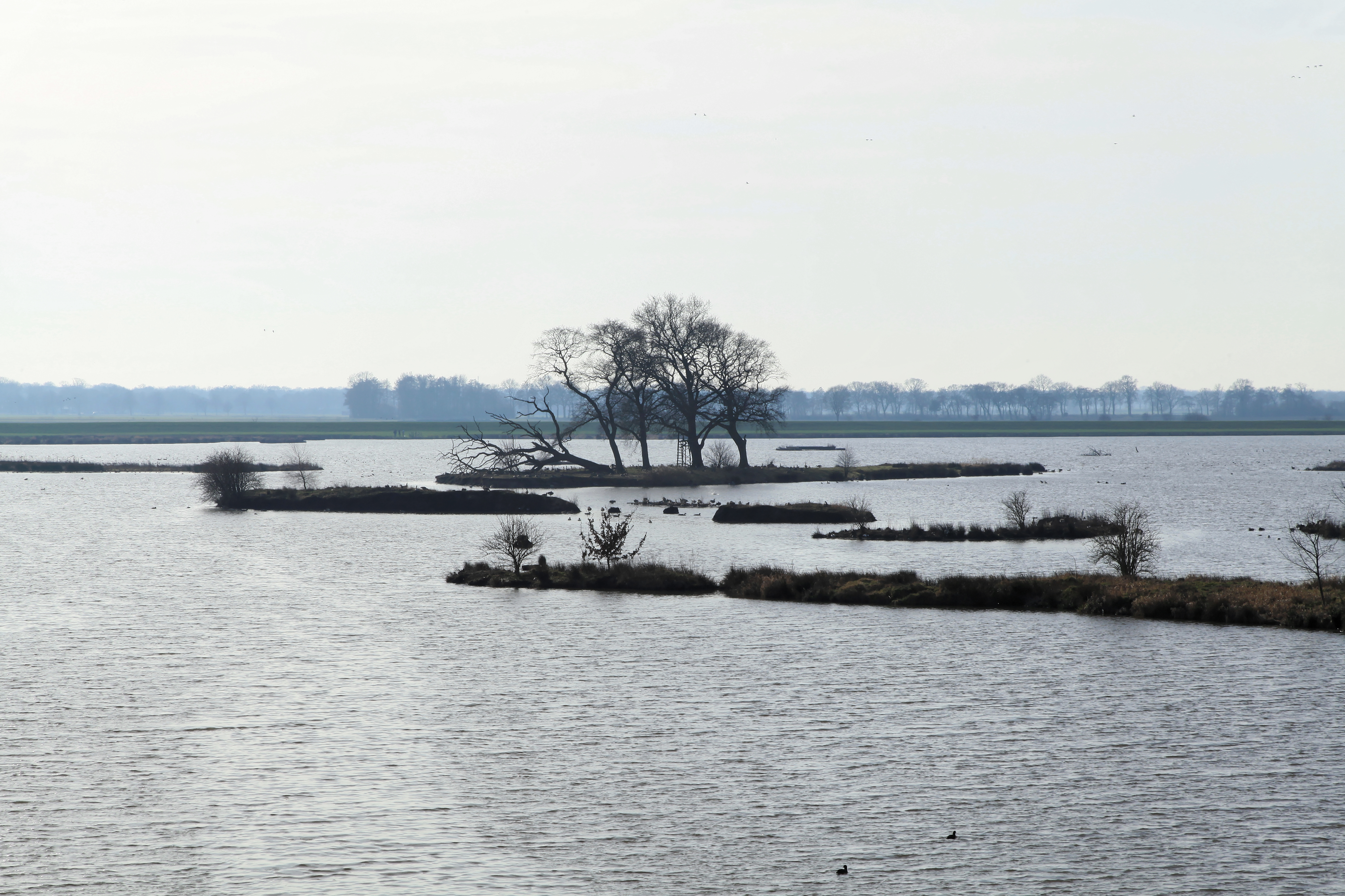 Blick vom Ein- und Auslassbauwerk Holter Hammrich auf das Alte Tief, Deichstraße in Rhauderfehn